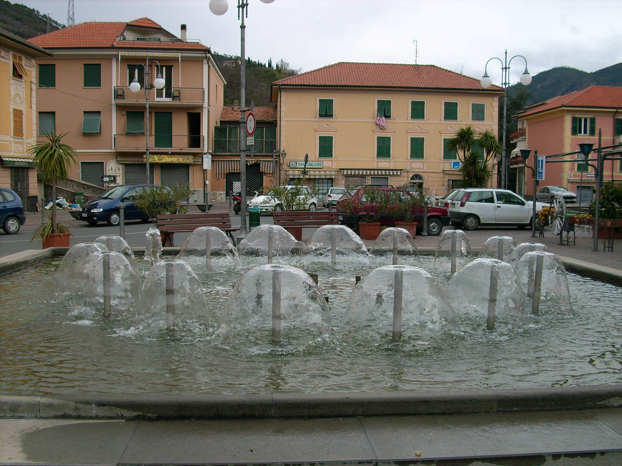 Fontana di Casarza Ligure, Liguria, Italia